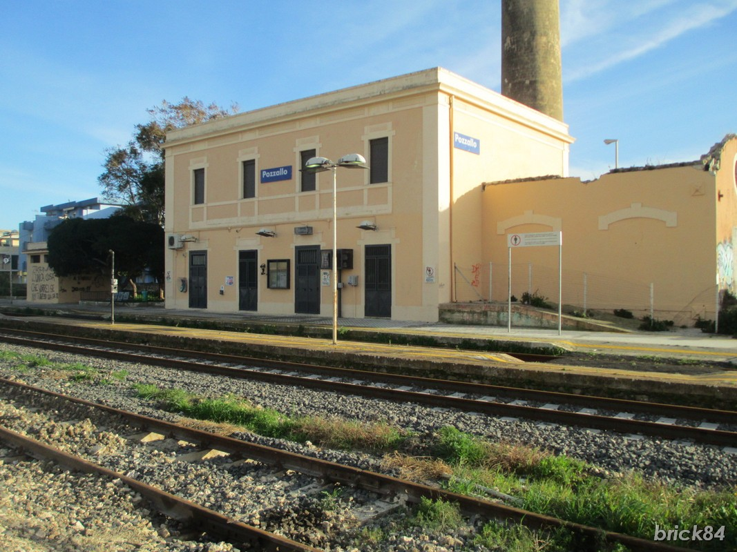 La stazione di Pozzallo nel 2018